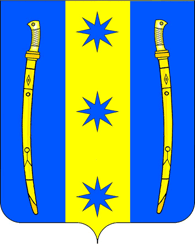 Герб Бесскорбненского сельского поселения, Краснодарский край, Россия.